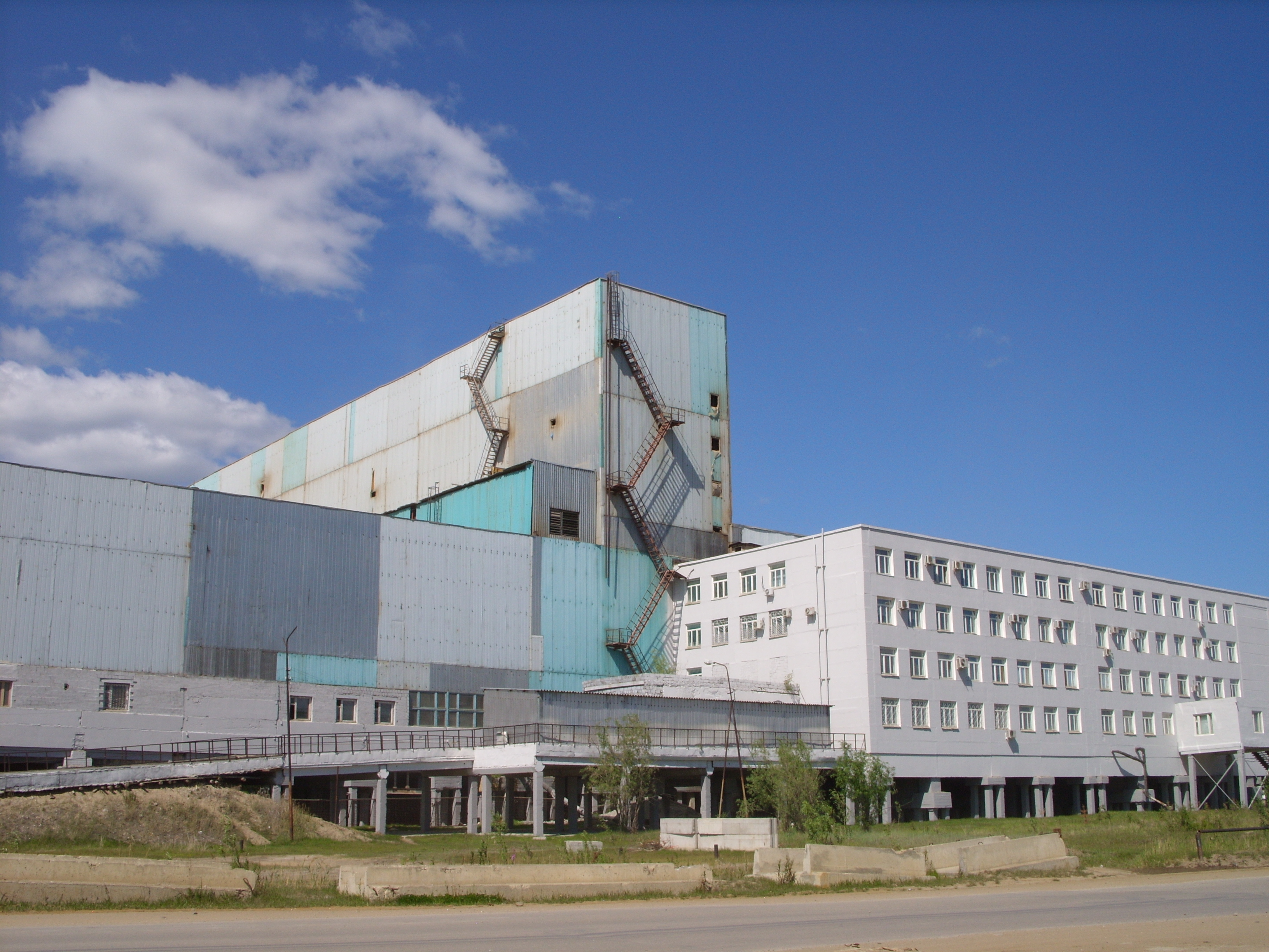 Якутск. Фото 2011 г.